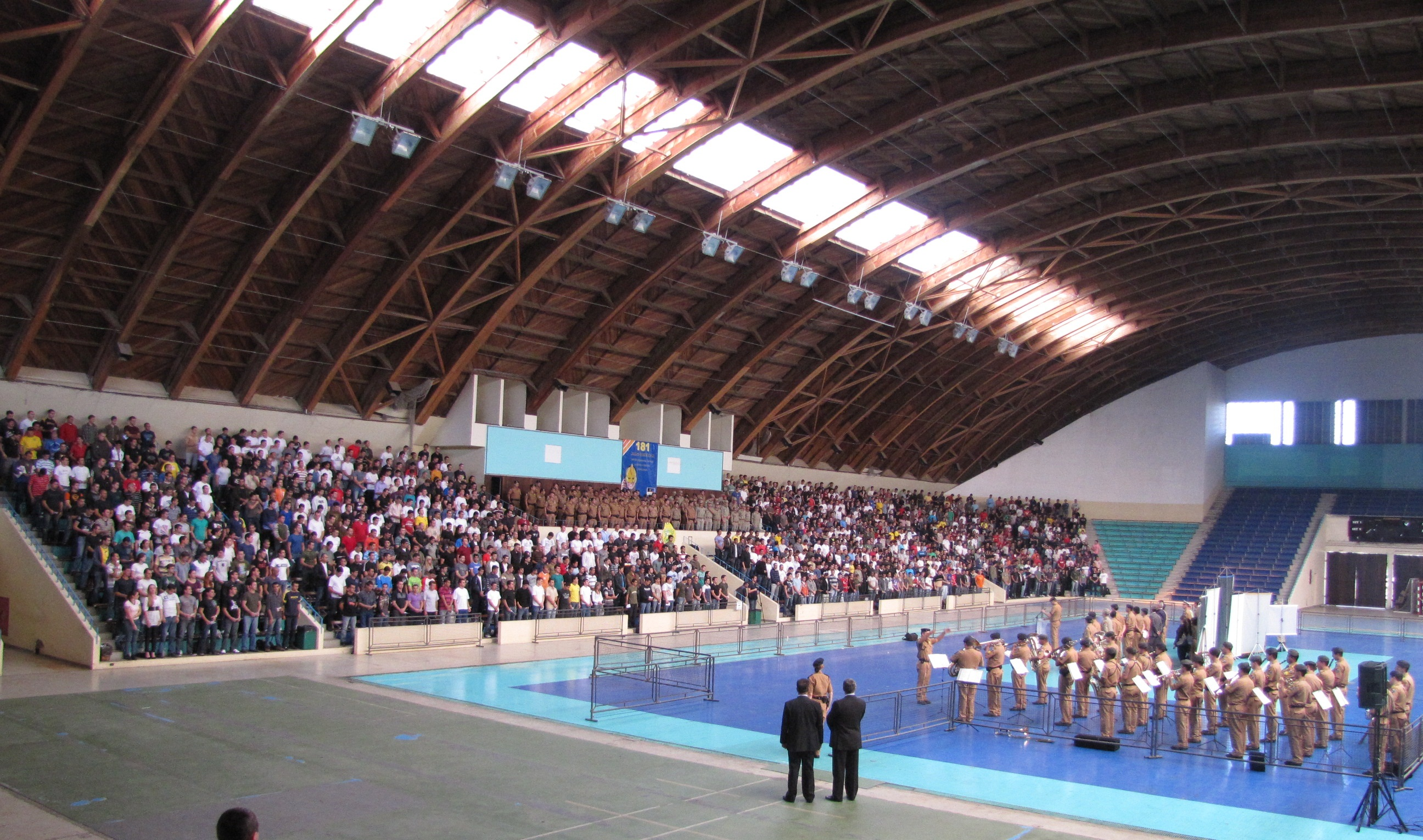 Recepção, pela Polícia Militar do Paraná, aos soldados aprovados no Concurso 2010 - Ginásio do Tarumã.